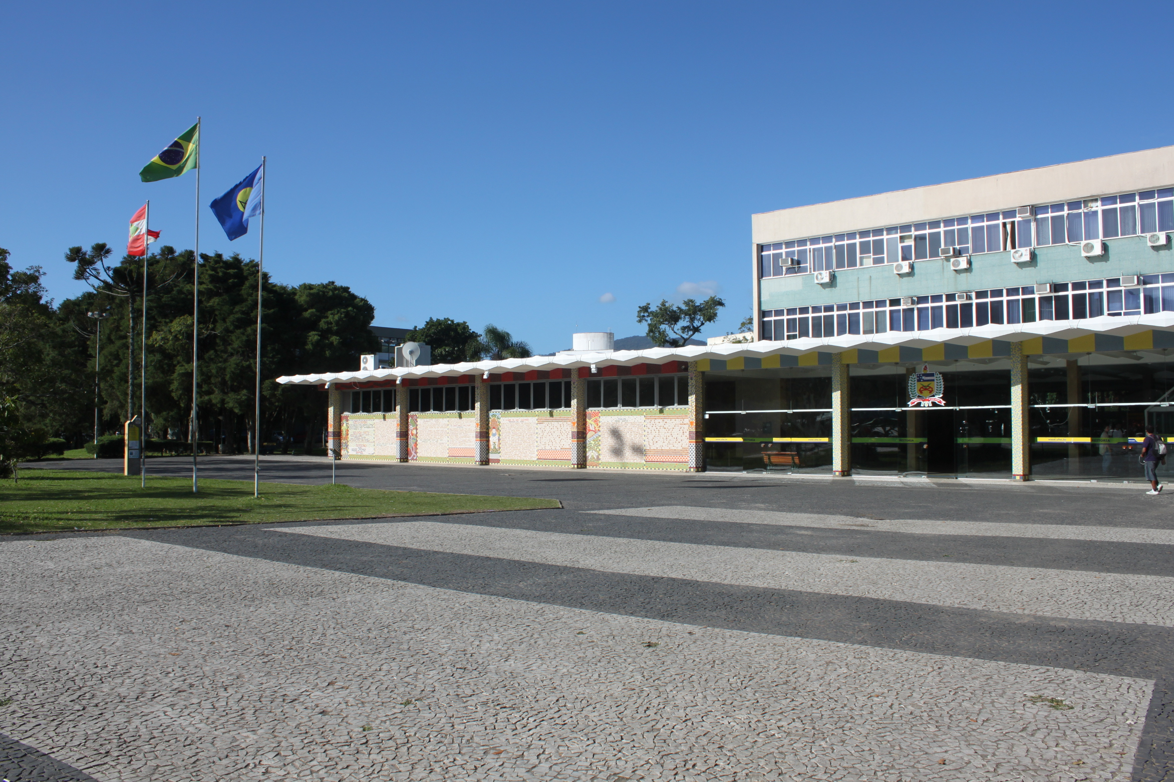 Vista do prédio da Reitoria da UFSC, Praça da Cidadania, Campus Reitor João David Ferreira Lima - Florianópolis/SC